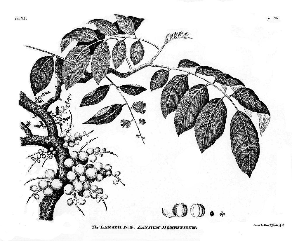 Lanseh